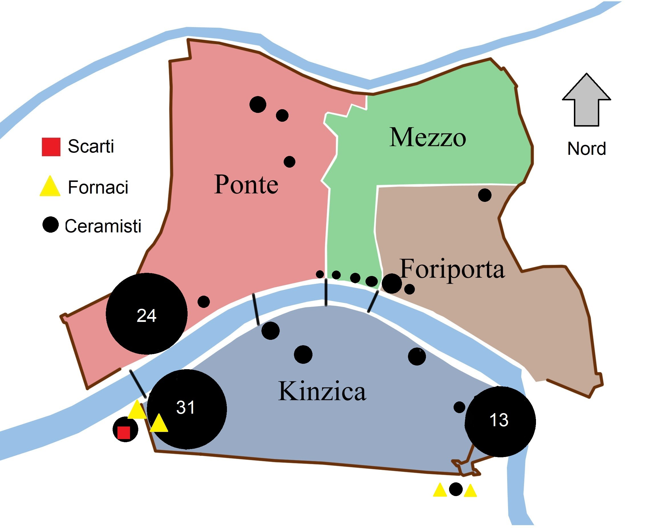 Mappa che mostra approssimativamente la presenza dei ceramisti e delle fornaci durante il XIV secolo. Sono anche indicati i punti cittadini dove sono state rinvenute discariche di scarti di fornace o d'uso (La grandezza dei cerchi che indicano i ceramisti varia. In base a questa i cerchi indicano da 1 a 7 ceramisti, sopra i 7 viene esplicitato il numero).